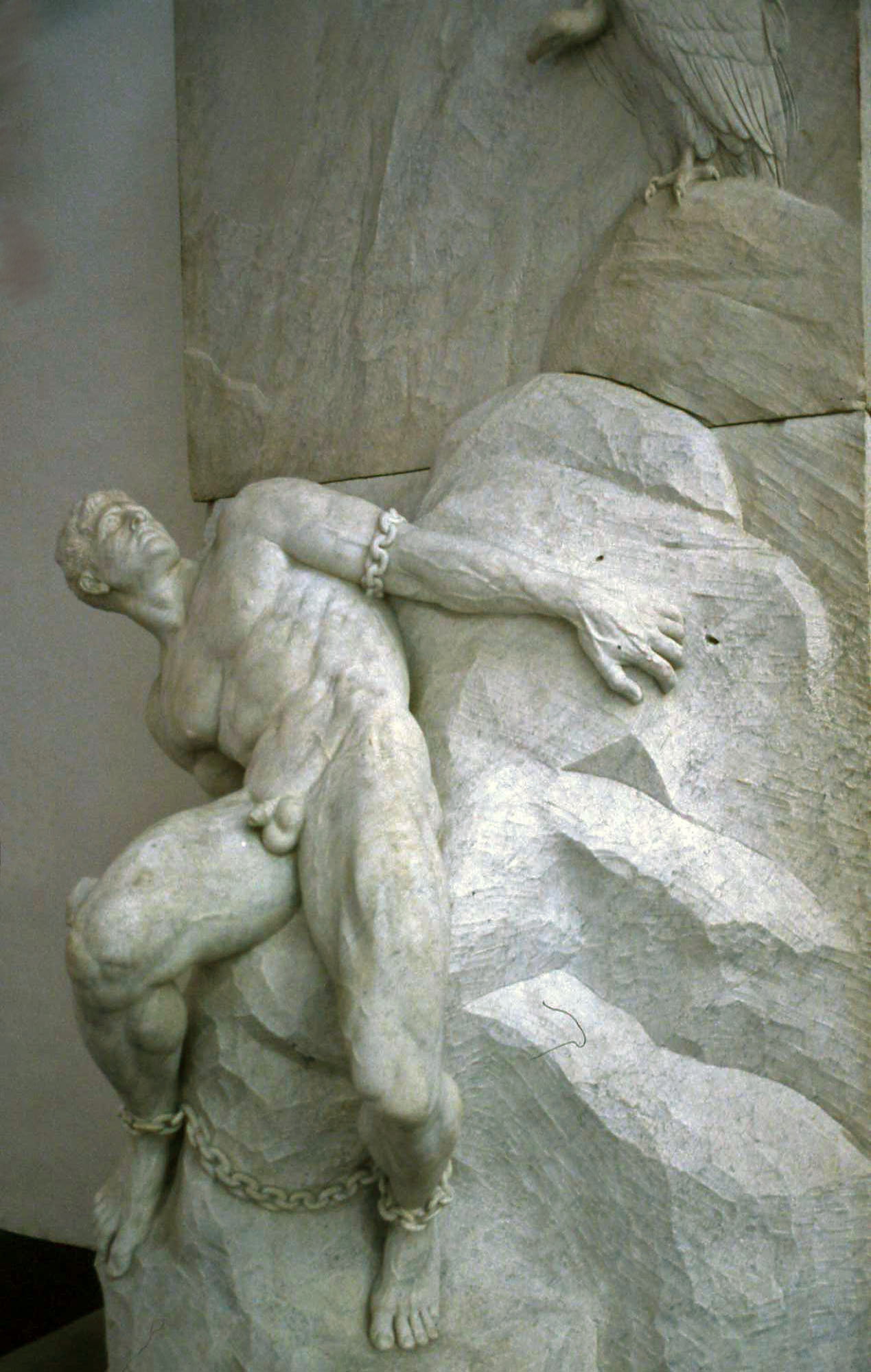 Prometheus (ca. 1900), Reinhold Begas (Berlin)